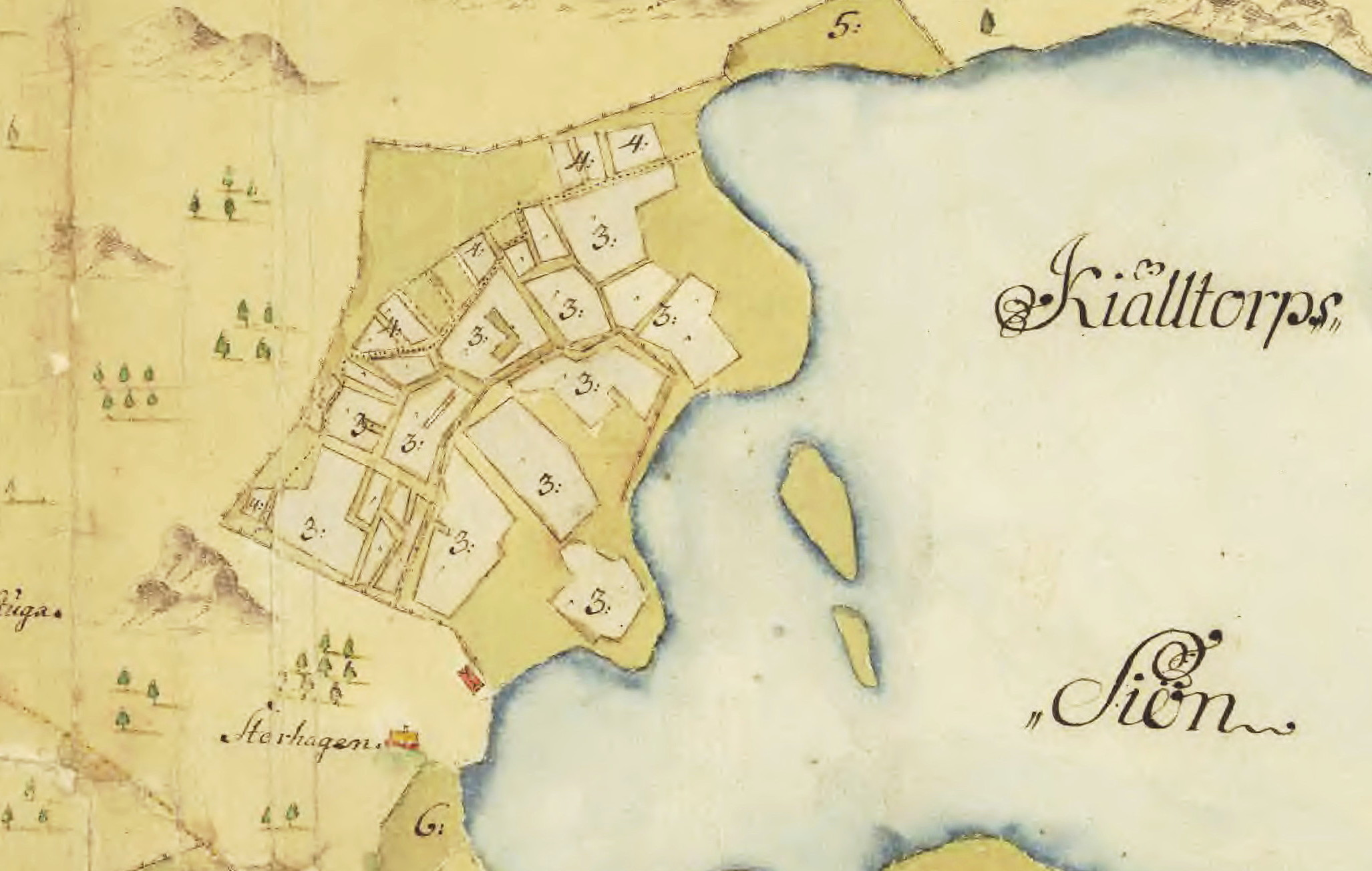 Del av karta över Nacka gård med Stengärdet